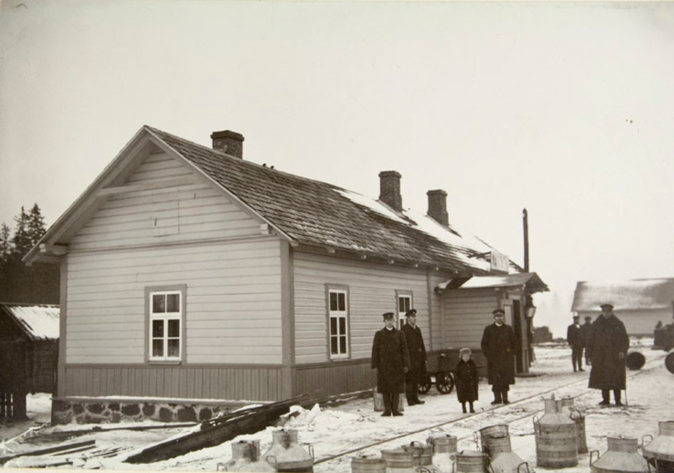 Hagudi jaamahoone 20. sajandi alguses